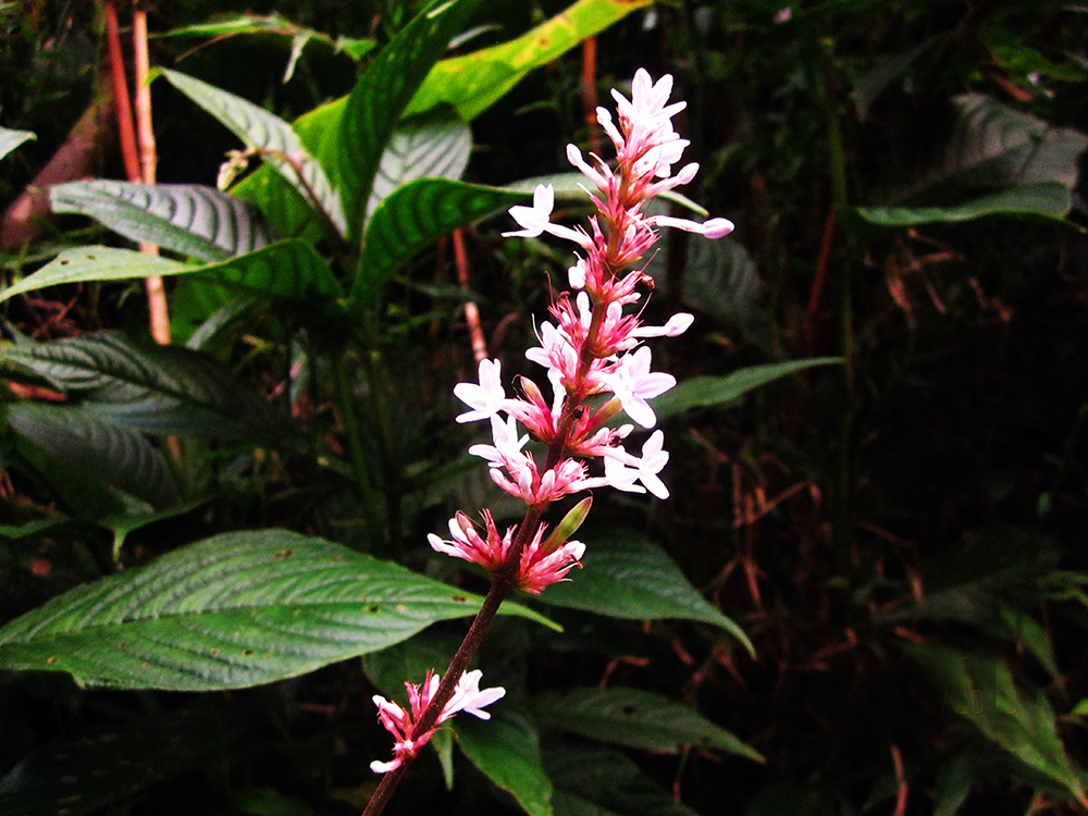 Variedad de flores en Velo de Plata